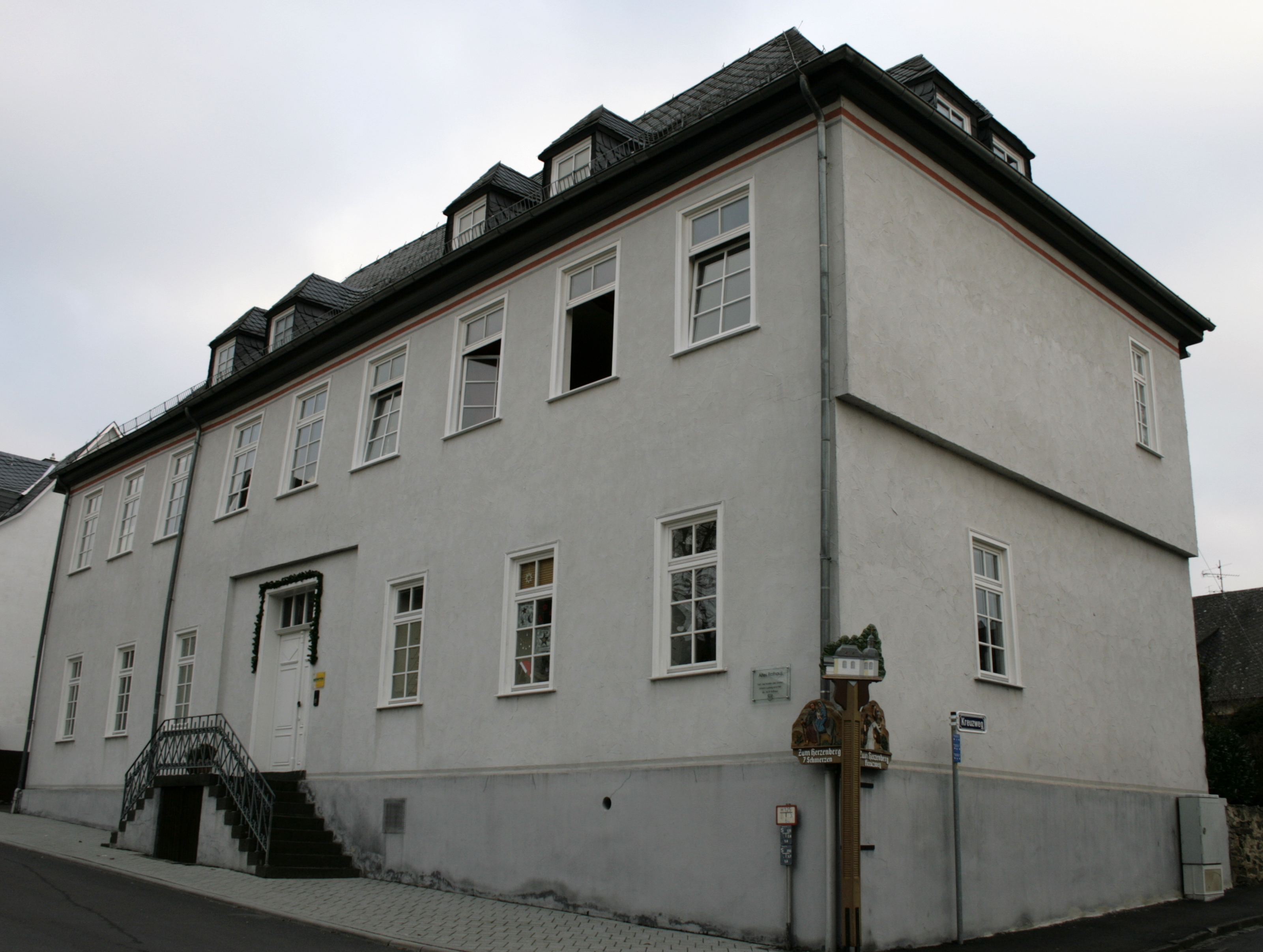 Ehemaliges Rathaus in Hadamar, Deutschland